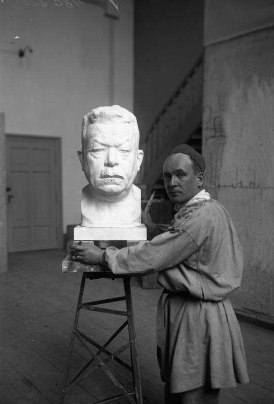 Die neue Ebertbüste für den Reichstag, ausgeführt von Herrn Prof. Bleeker, München! geht seiner Vollendung entgegen und dürfte demnächst aufgestellt werden. Die neue Büste des verstorbenen Reichspräsidenten Friedrich Ebert, welche in der Wandelhalle des Reichstages Aufstellung finden wird, entworfen von dem Münchner Bildhauer Professor Bleeker.